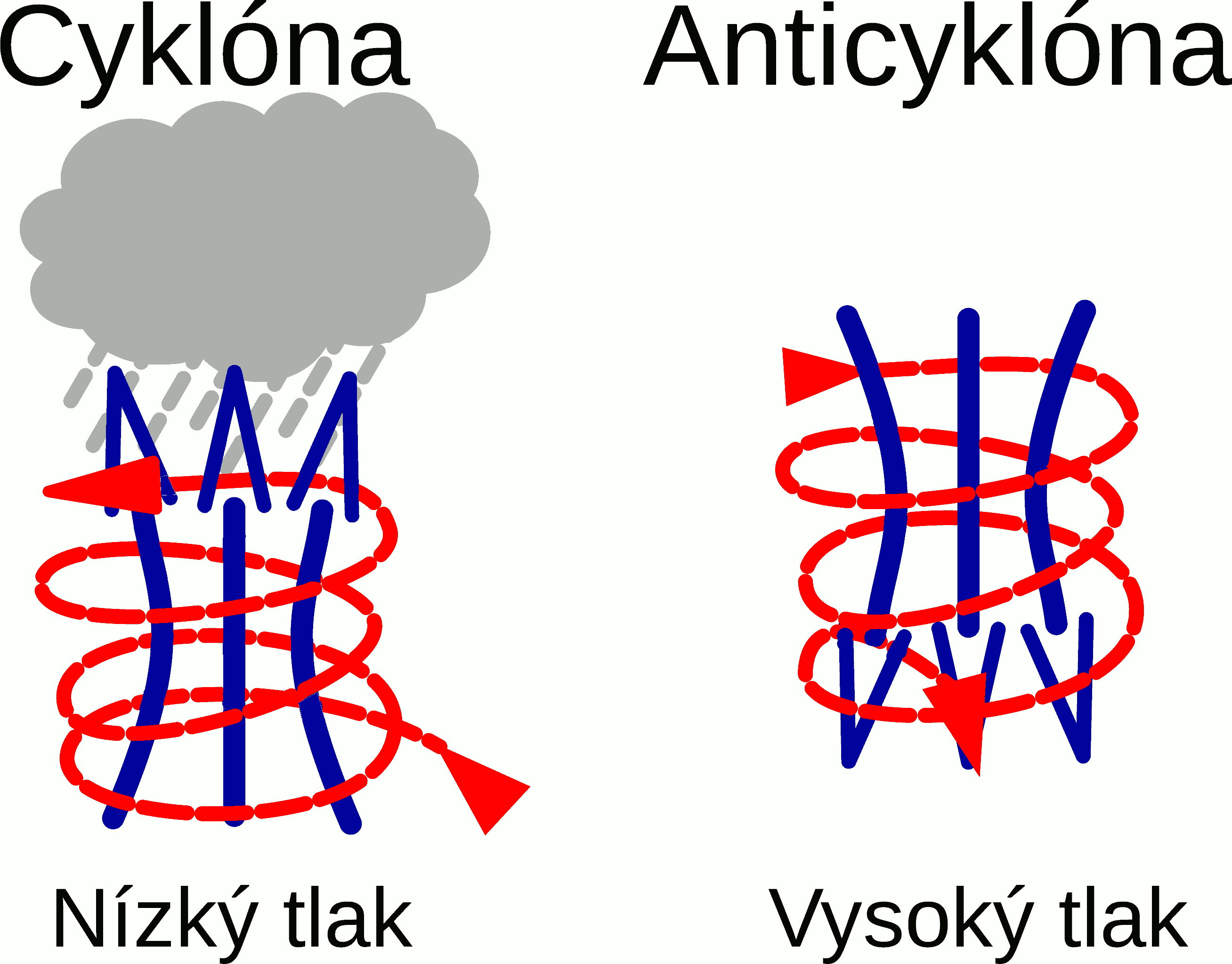 Cyklóna (tlaková níže) a anticyklóna (tlaková výše)